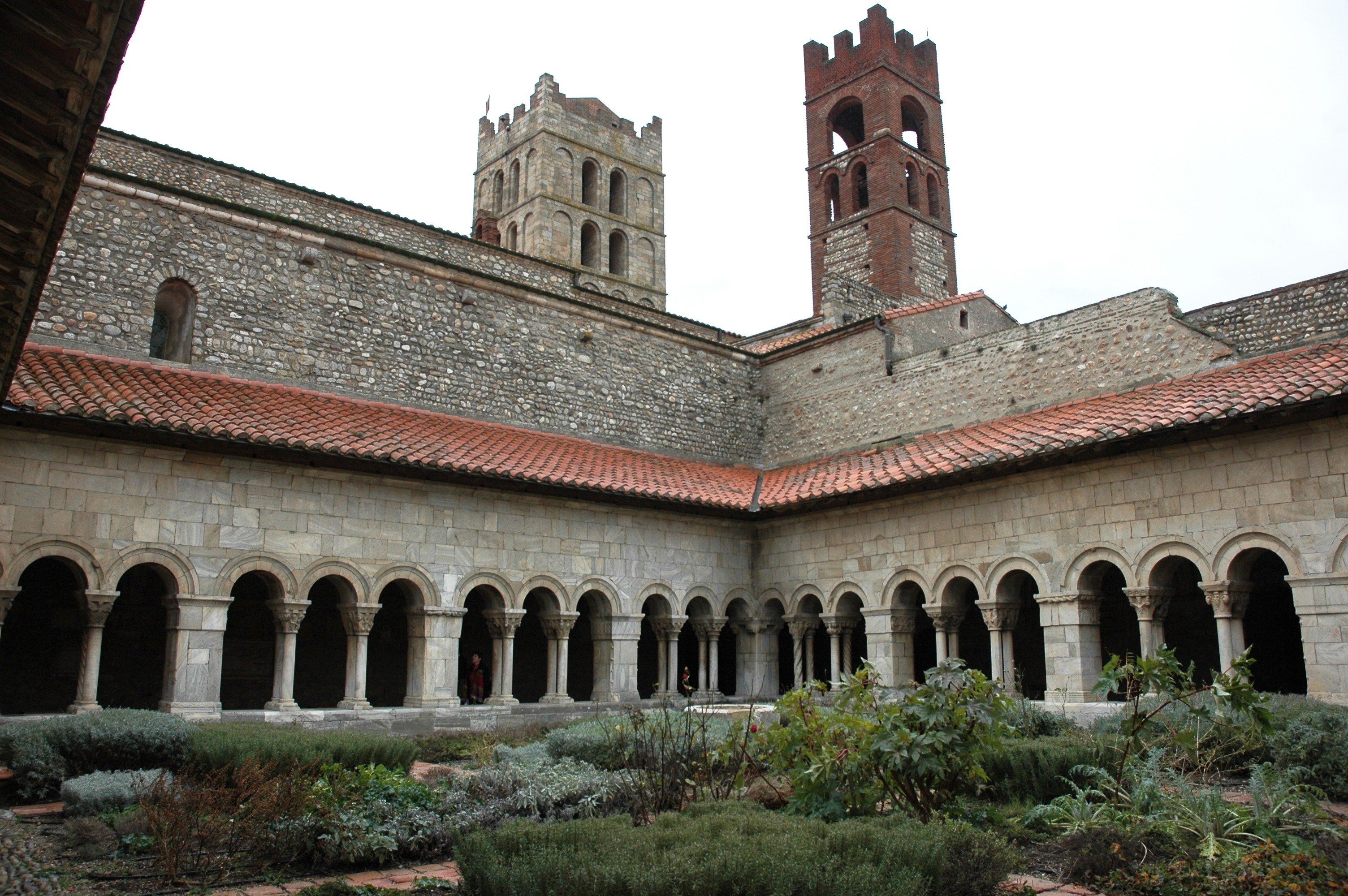 Catedral d'Elna - Façana